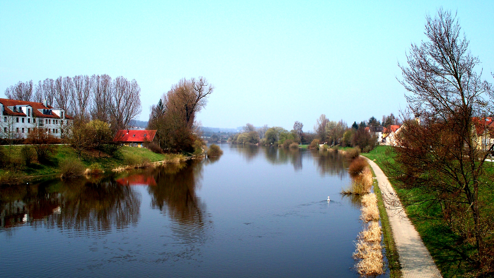 Der Regen in Regensburg.